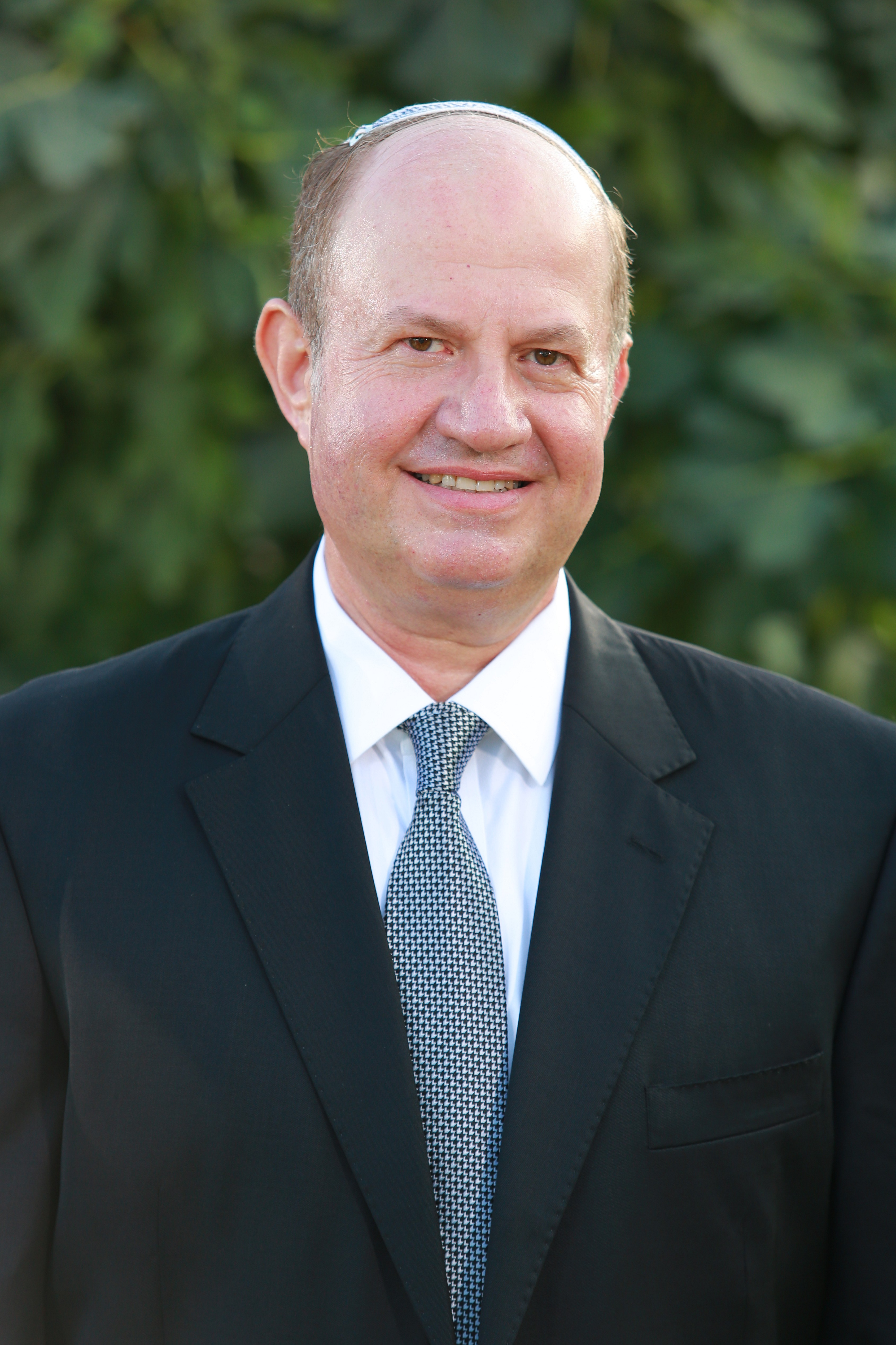 ישראל גולדברג, פרסומי ישראל ירושלים